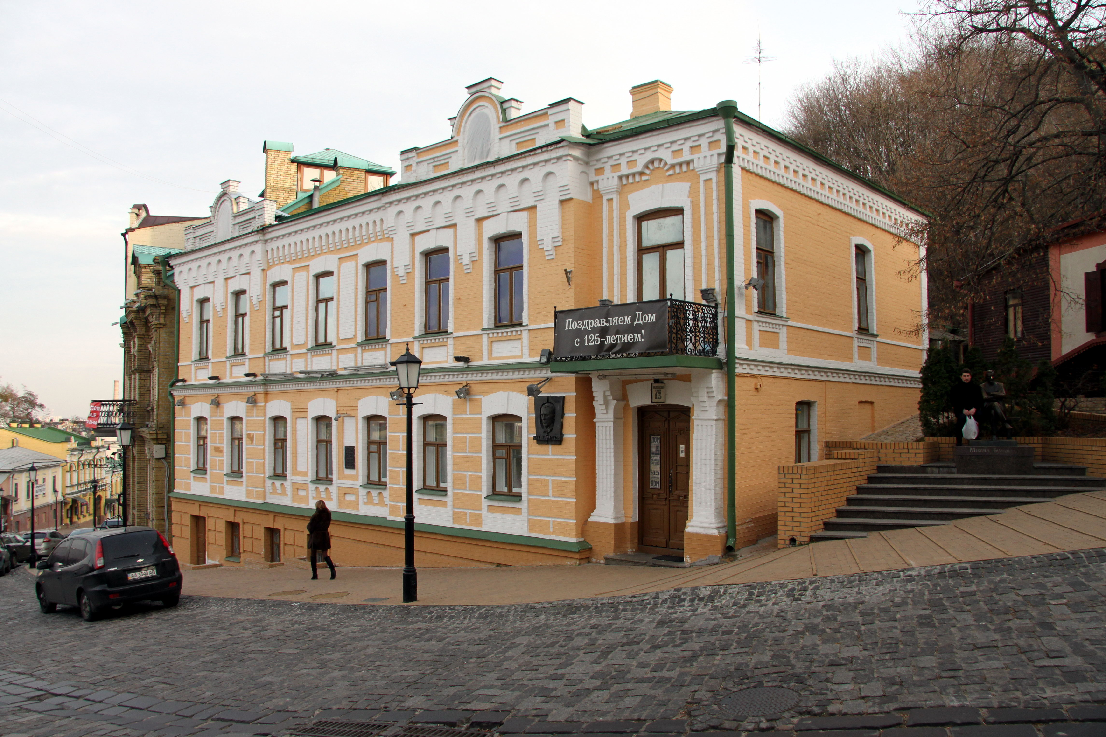 Будинок, в якому жив письменник М. П. Булгаков, Андріївський узвіз, 13, Київ